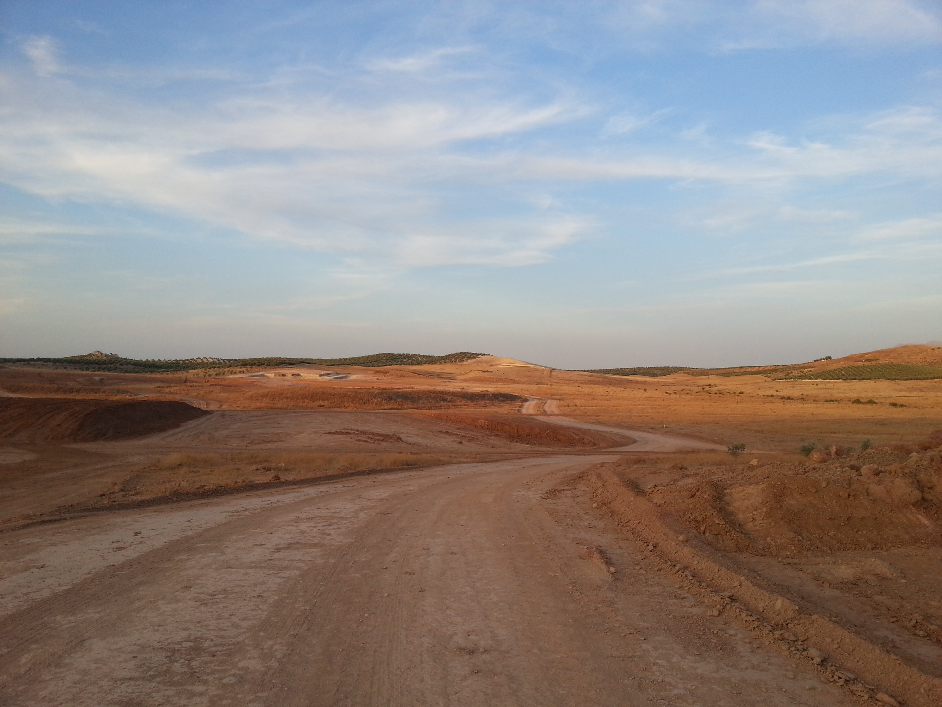 Movimiento de tierras en los llanos del Cadimo.